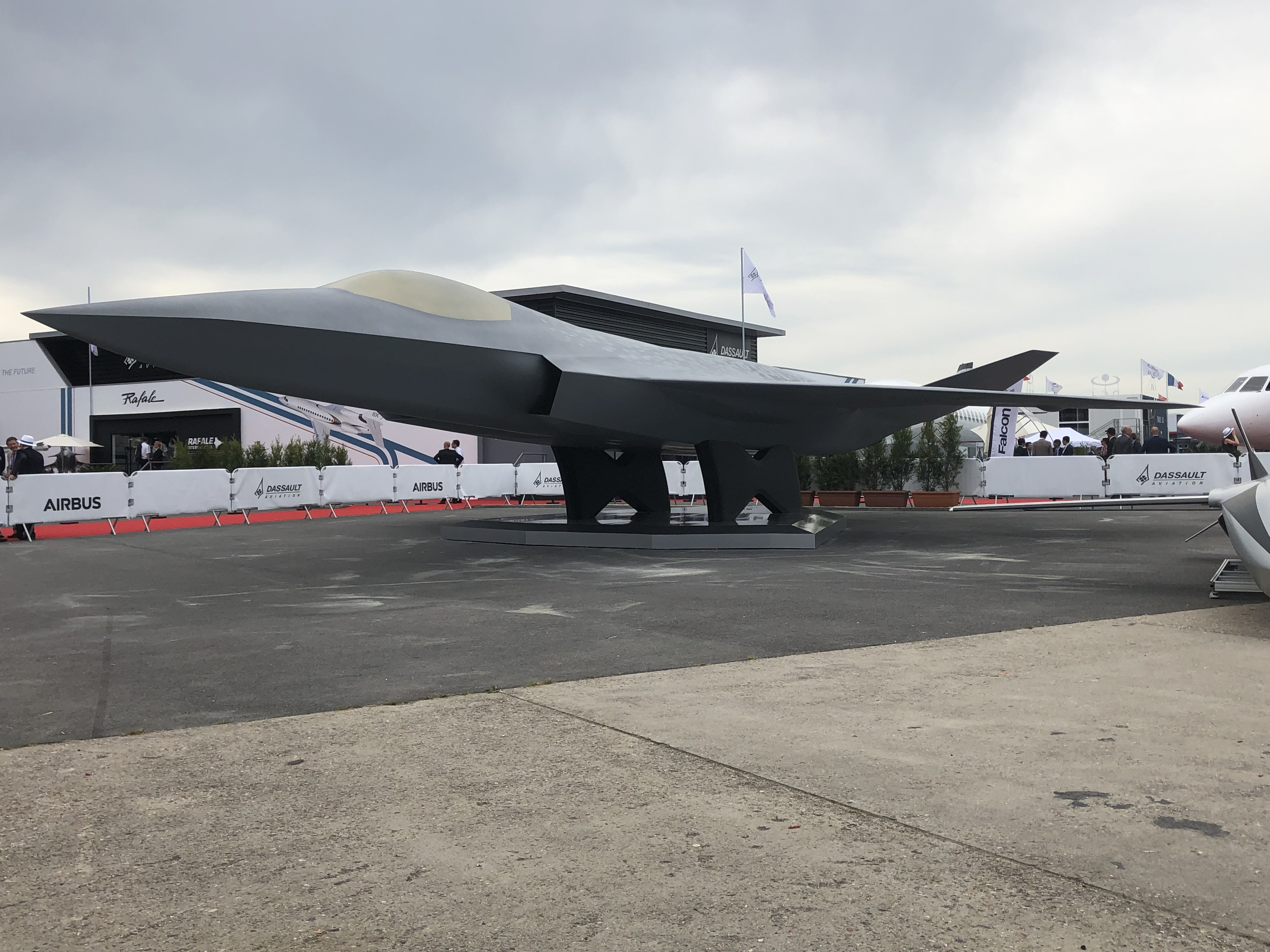 Maquette du Système de Combat Aérien du Futur européen, dévoilée au salon du Bourget 2019